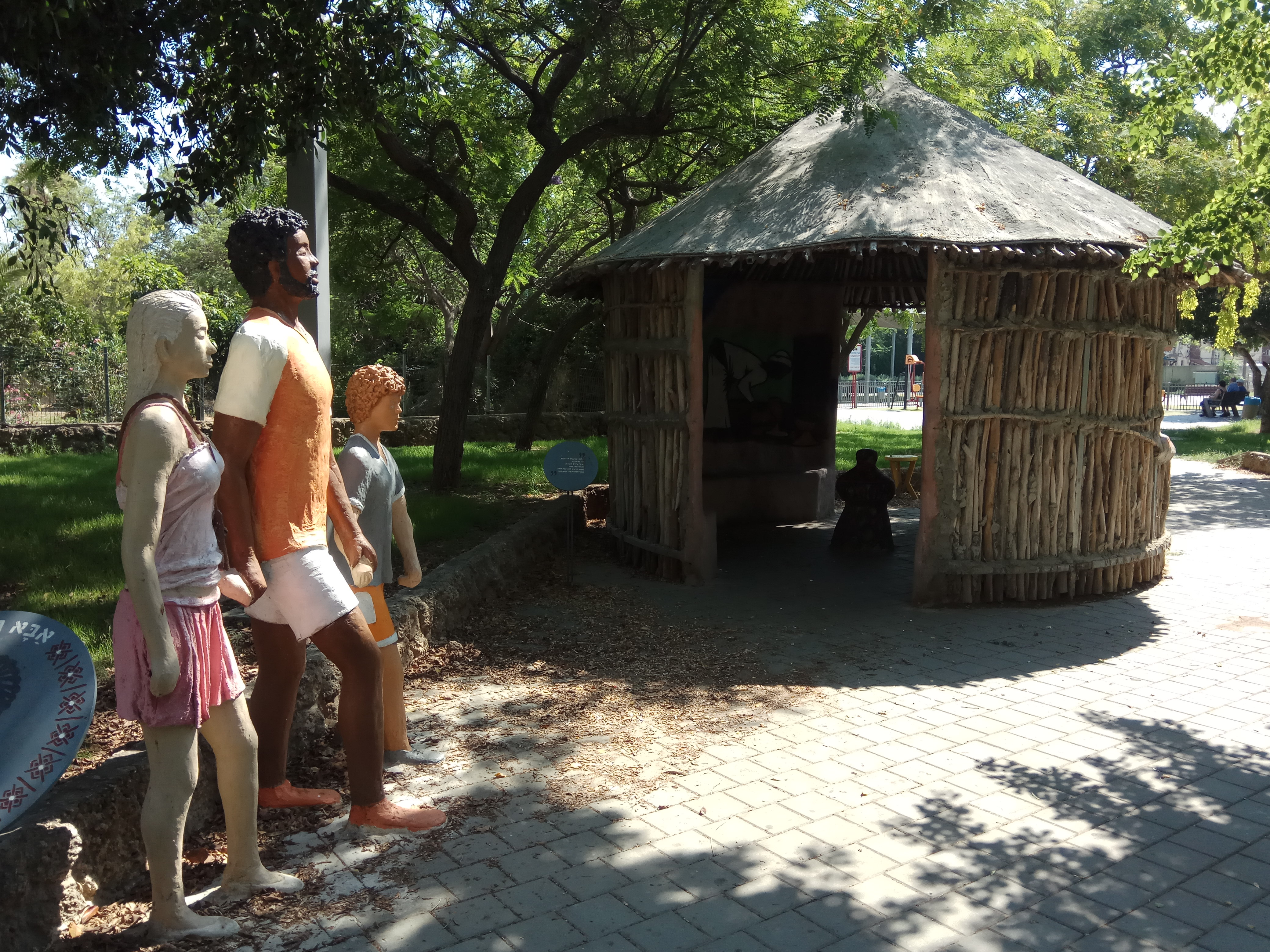 גן סיפור אבא חום בחולון